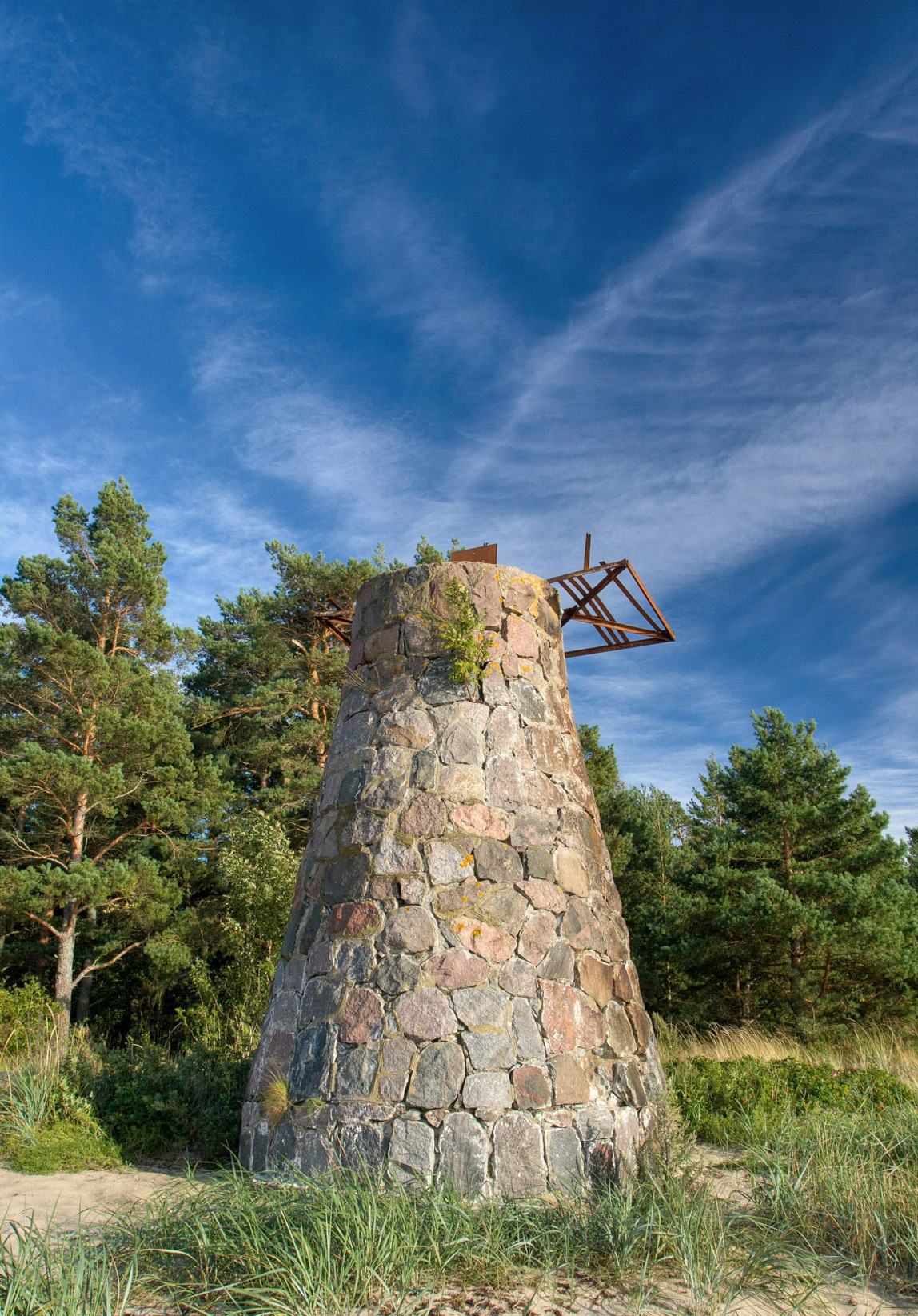 Telisna alumine päevamärk